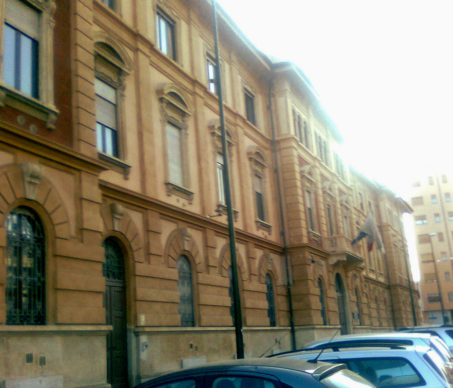 Walty1971,facciata palazzina amministrativa finanza di Torino,Borgo Filadelfia lato nord,Torino